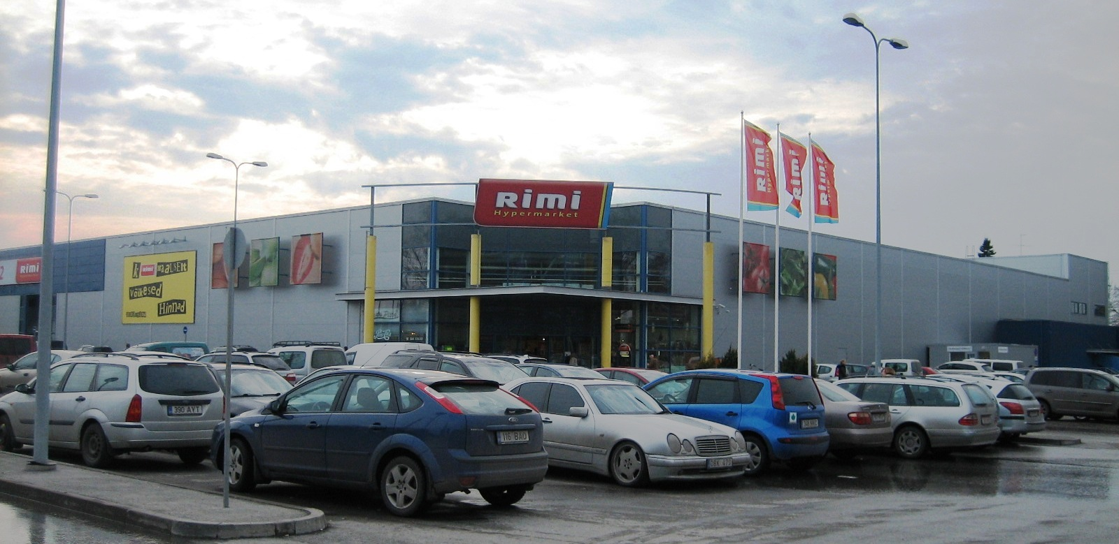 Hypermarket Rimi. Sõpruse pst 174/176.